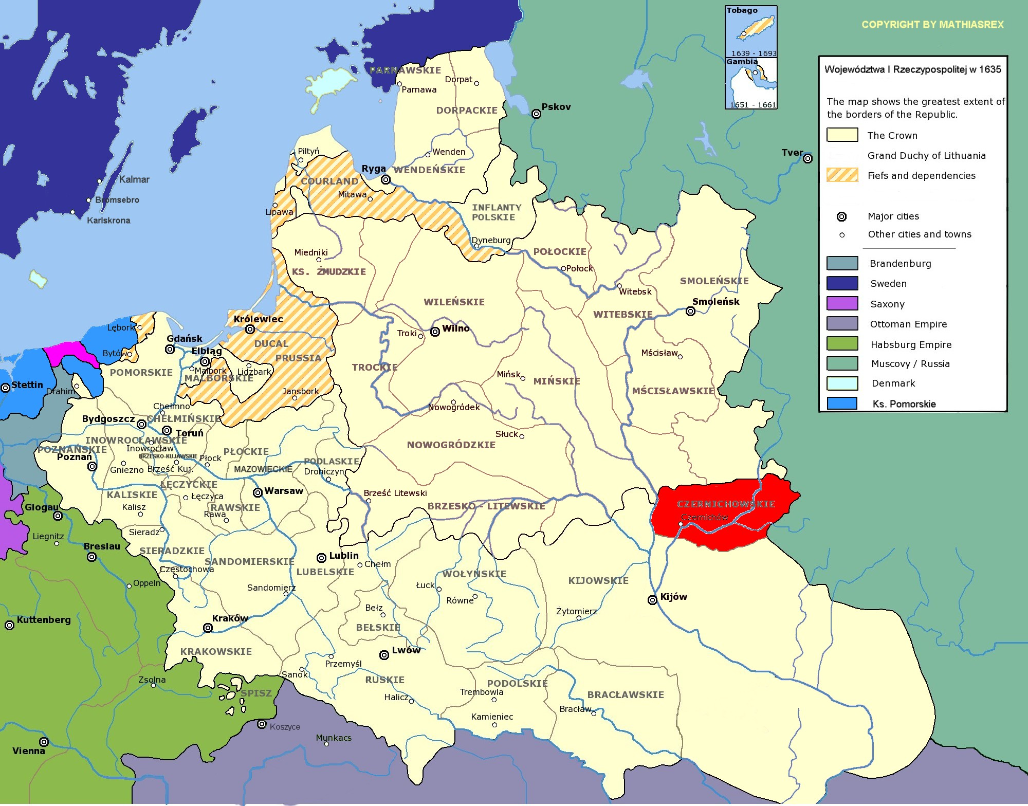 województwo czernihowskie I Rzeczypospolitej A modified copy of Image:Rzeczpospolita voivodships.png by Halibutt